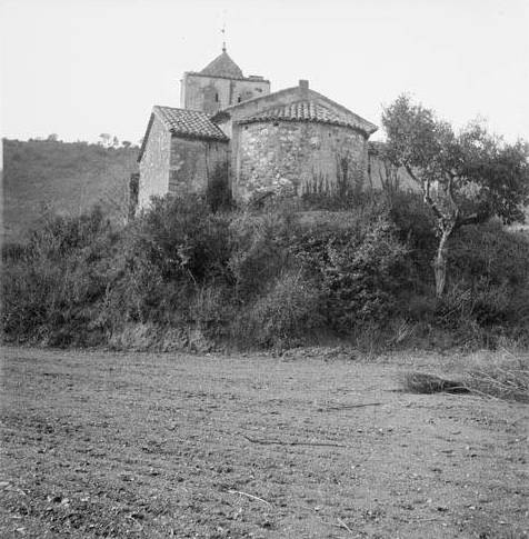 Imatge